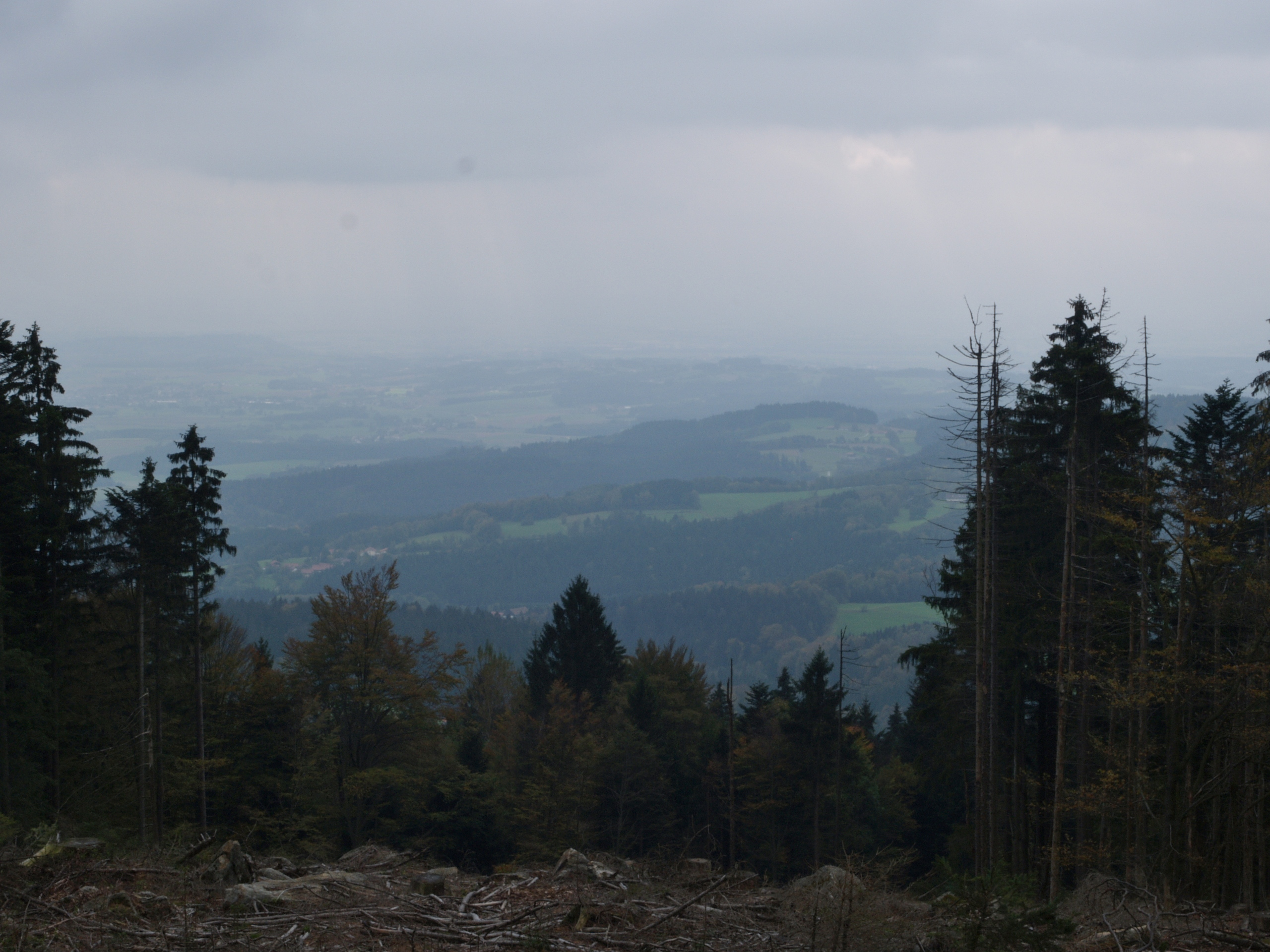 Blick vom Hadriwa-Kamm in die Donauebene